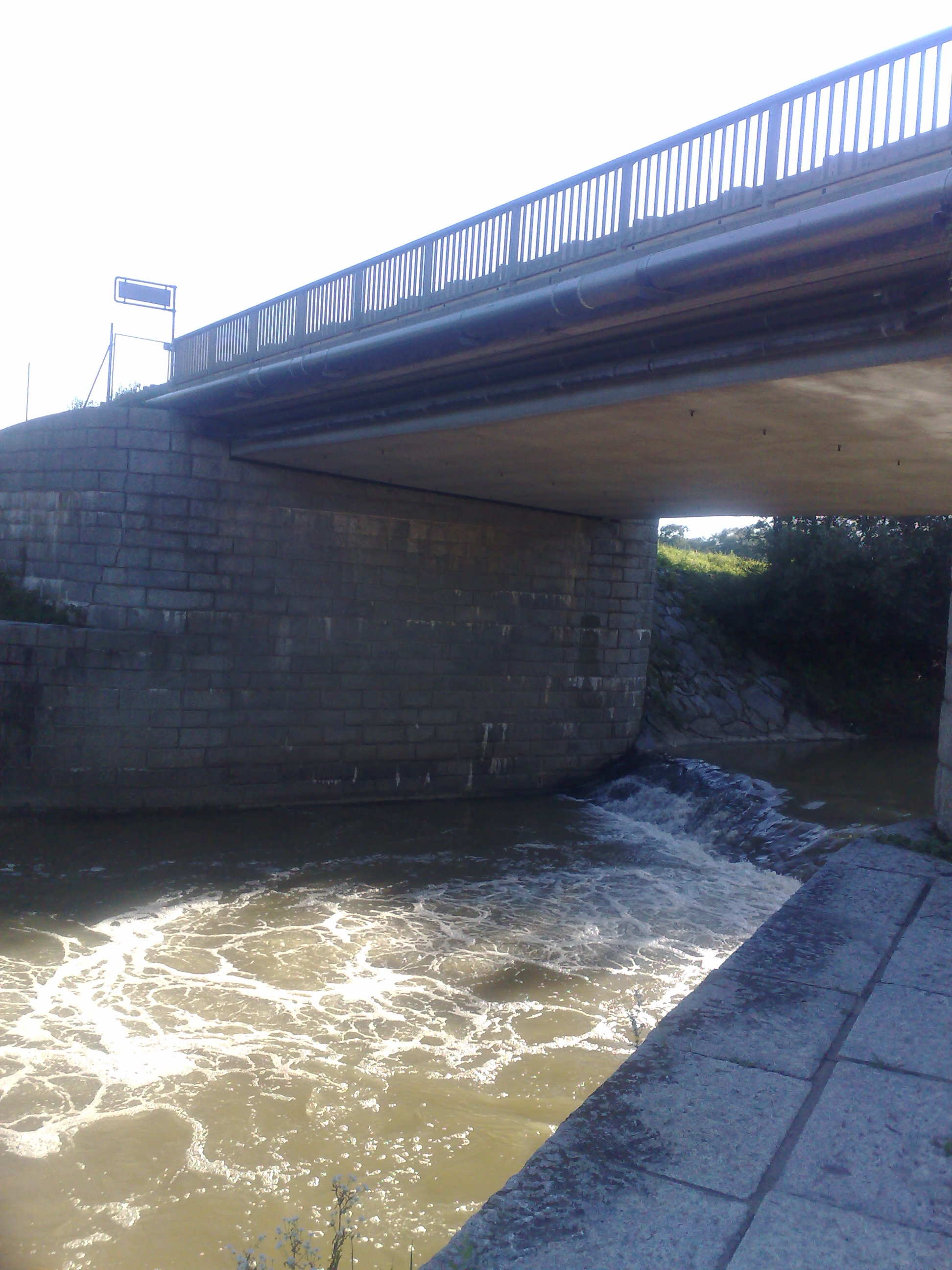 A Rába "vízesése" Jennersdorfnál, a híd alatt